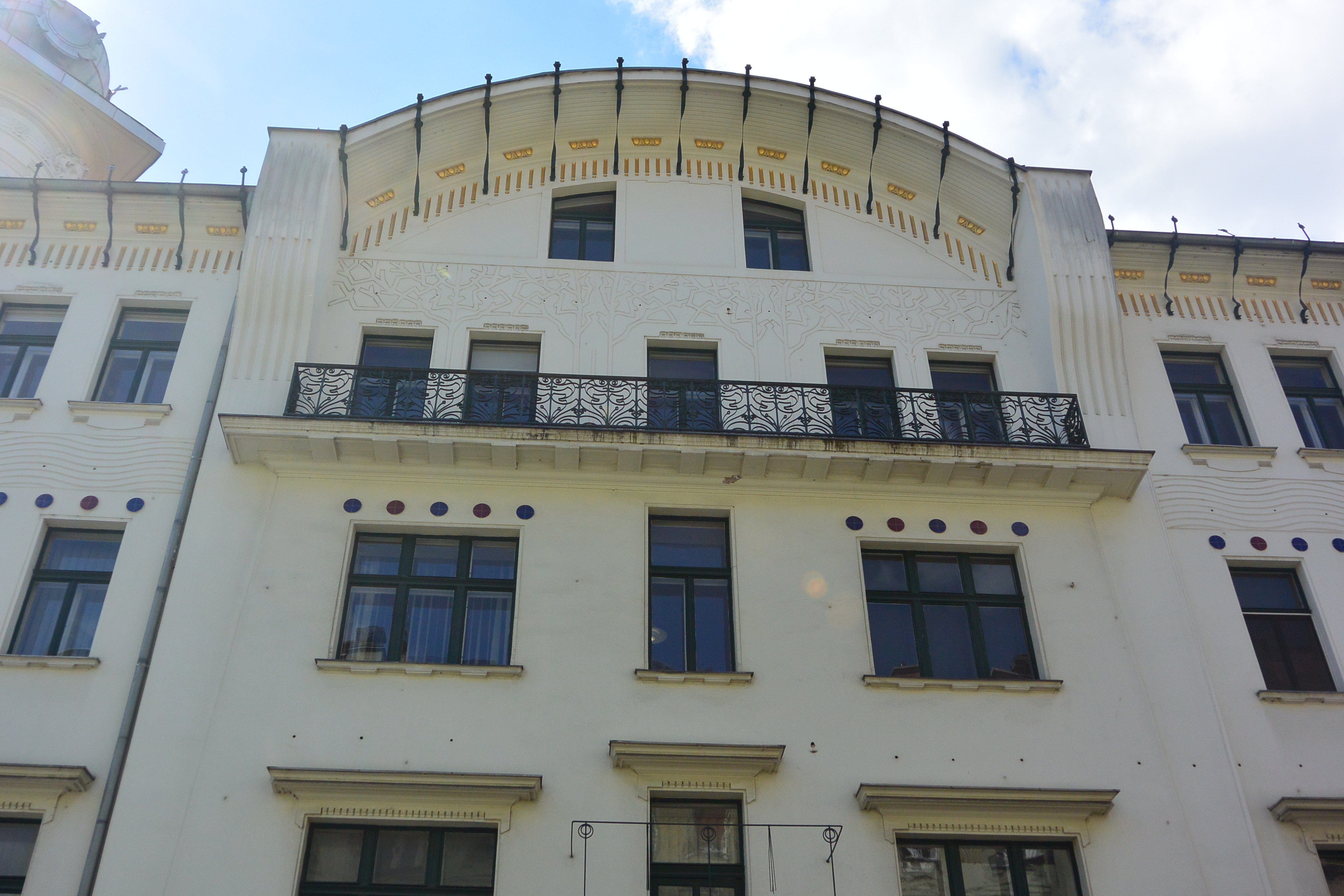 Laibach